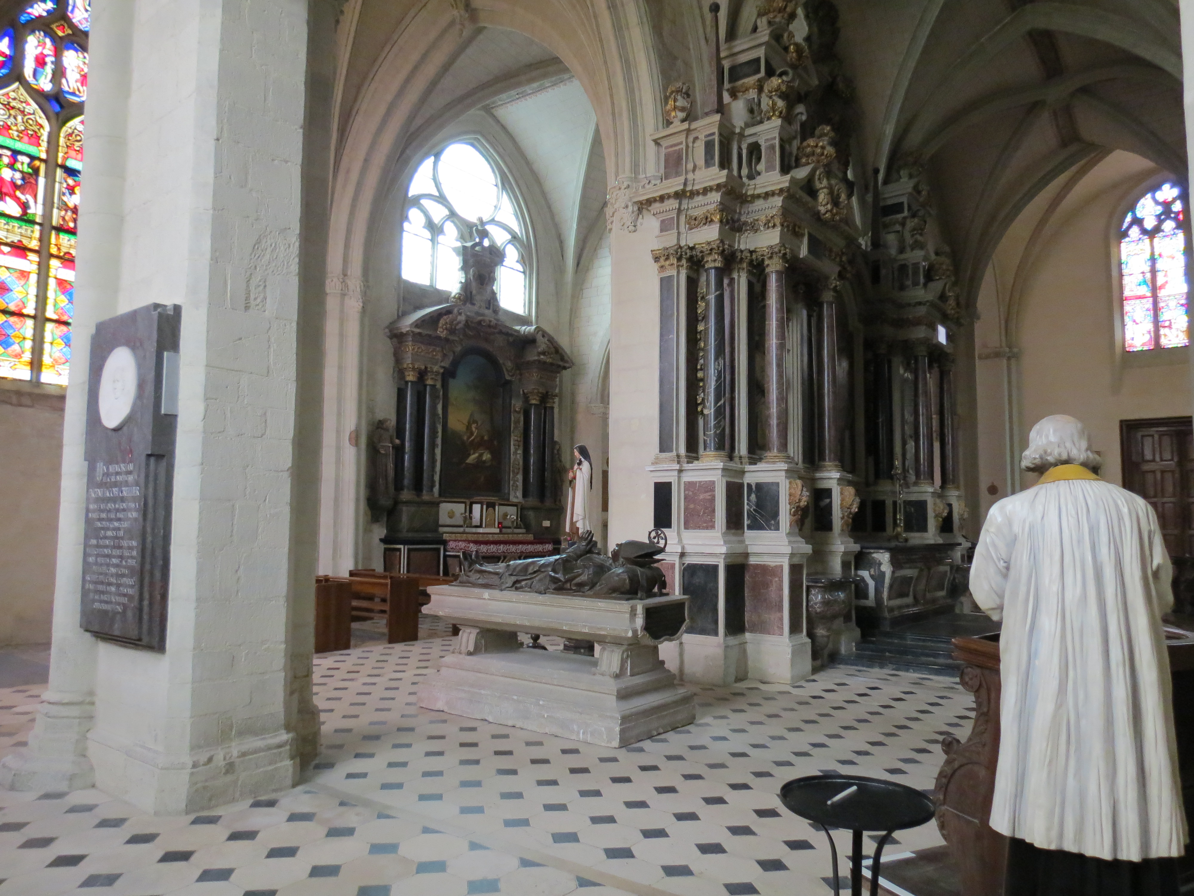 Vue traversante du chœur de la cathédrale de la Sainte-Trinité de Laval, Mayenne, Pays de la Loire.